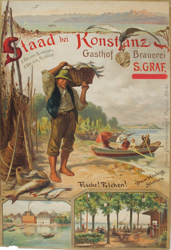 Plakat Staad bei Konstanz Gasthof Brauerei S. Graf. Grosse Gartenwirtschaft, Vorzügl. Küche. Fische! Felchen! Dampfschiff-Station. Chromolithographie bei M. Seeger Stuttgart, um 1900. 62 x 43 cm